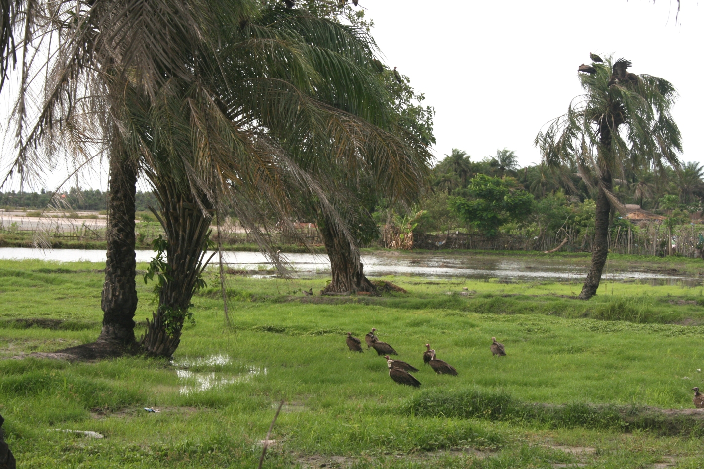 Le bolong au niveau de cap Skirring en Basse Casamance au Sénégal